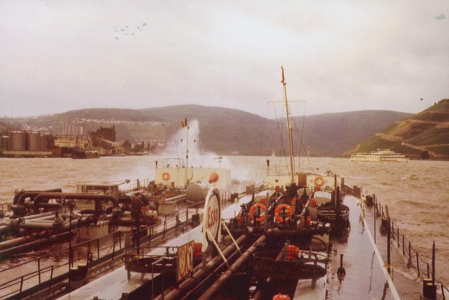 Tankkoppelverband zu Tal eigenes Bild 1982 F.Lang